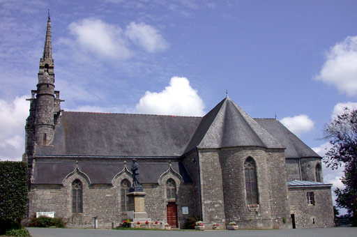 Description : La Chapelle-Neuve (22) - Église Notre-Dame de Pitié Date : juillet 2004 Auteur : Ifernyen Source : Archives personnelles, scan d'après diapositive Statut : GFDL Ifernyen